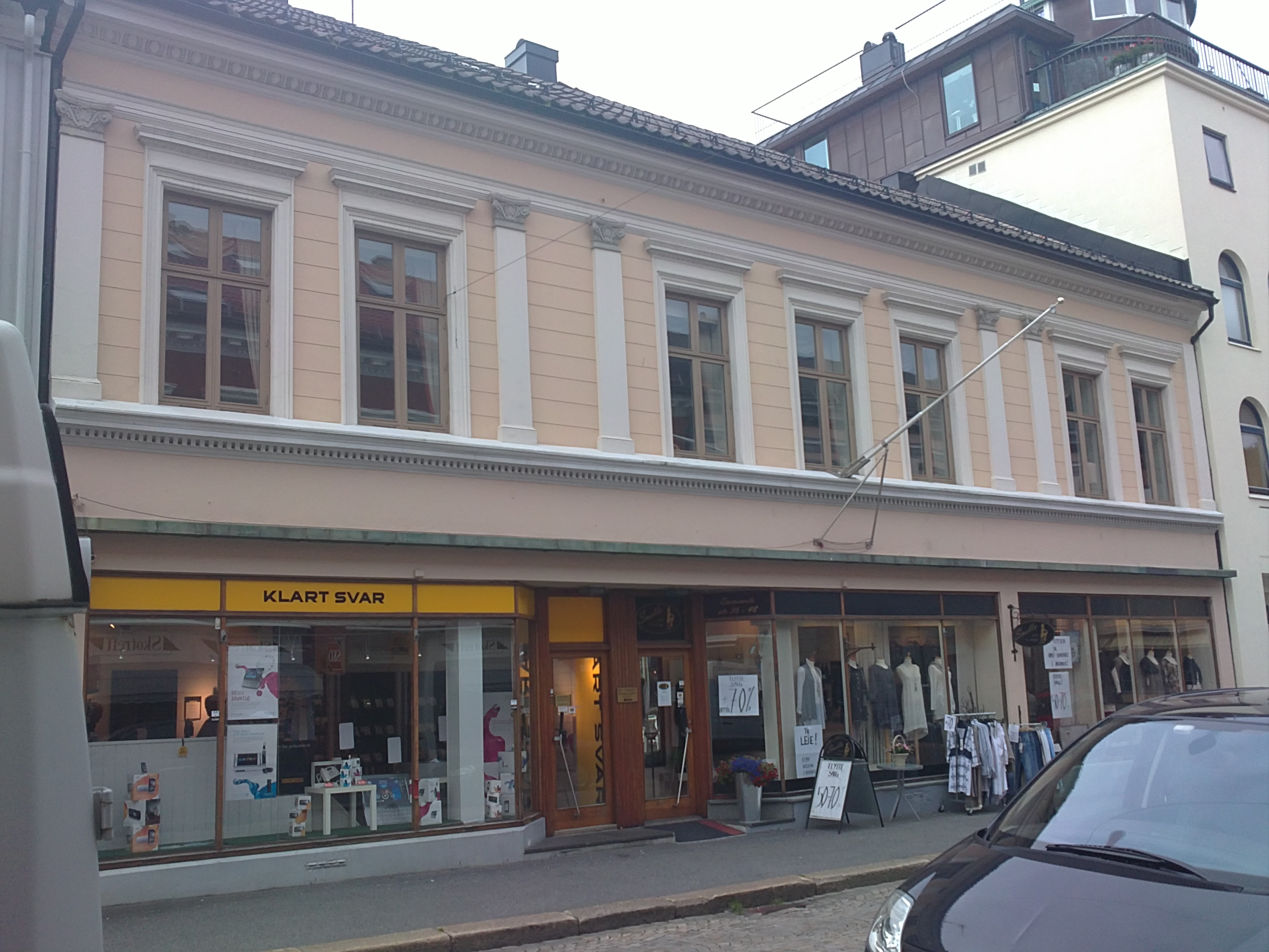 Bilde av Øvre Torggate 1, Larvik